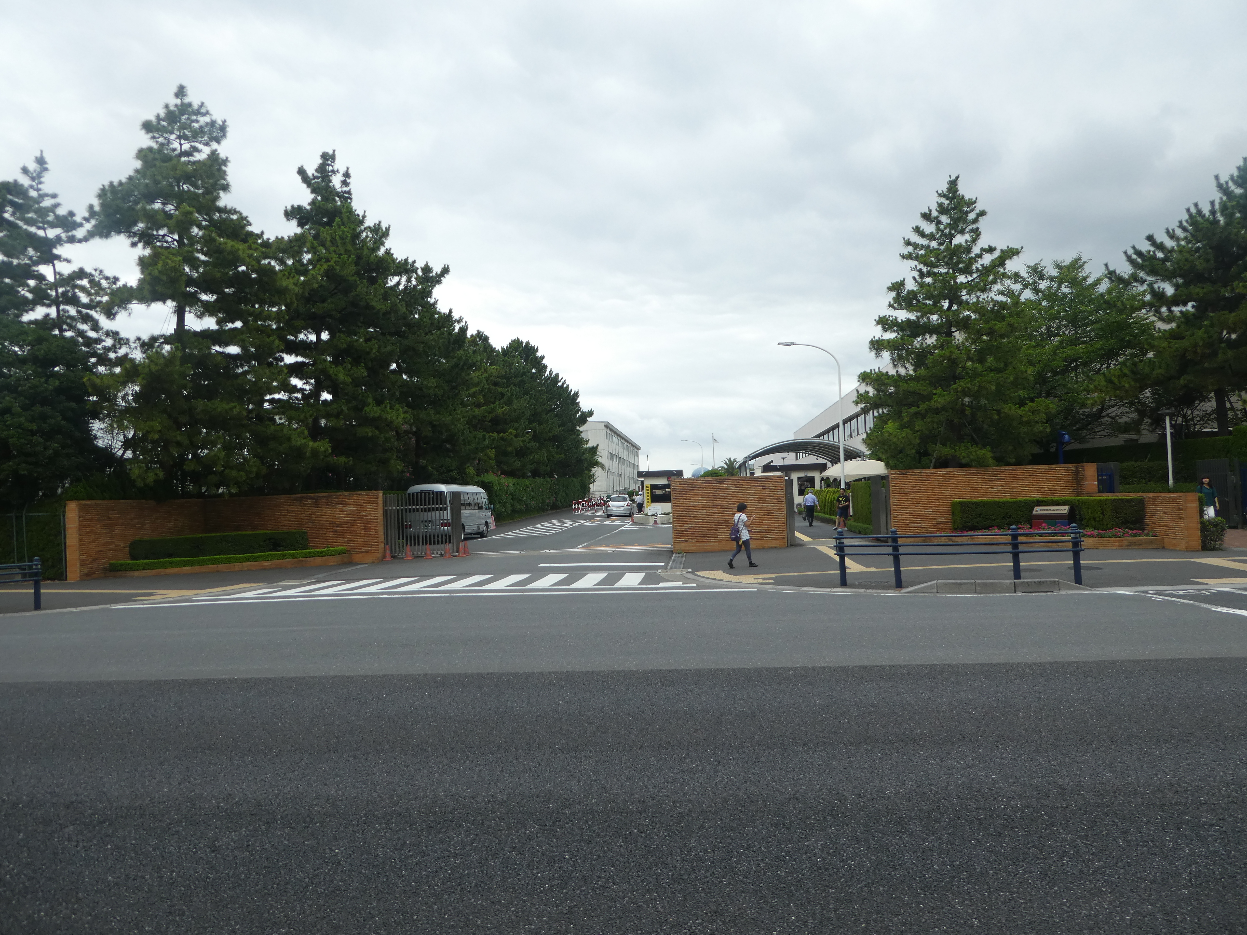 オリエンタルランド本社。